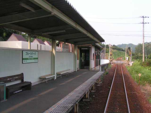 フルーツパーク駅